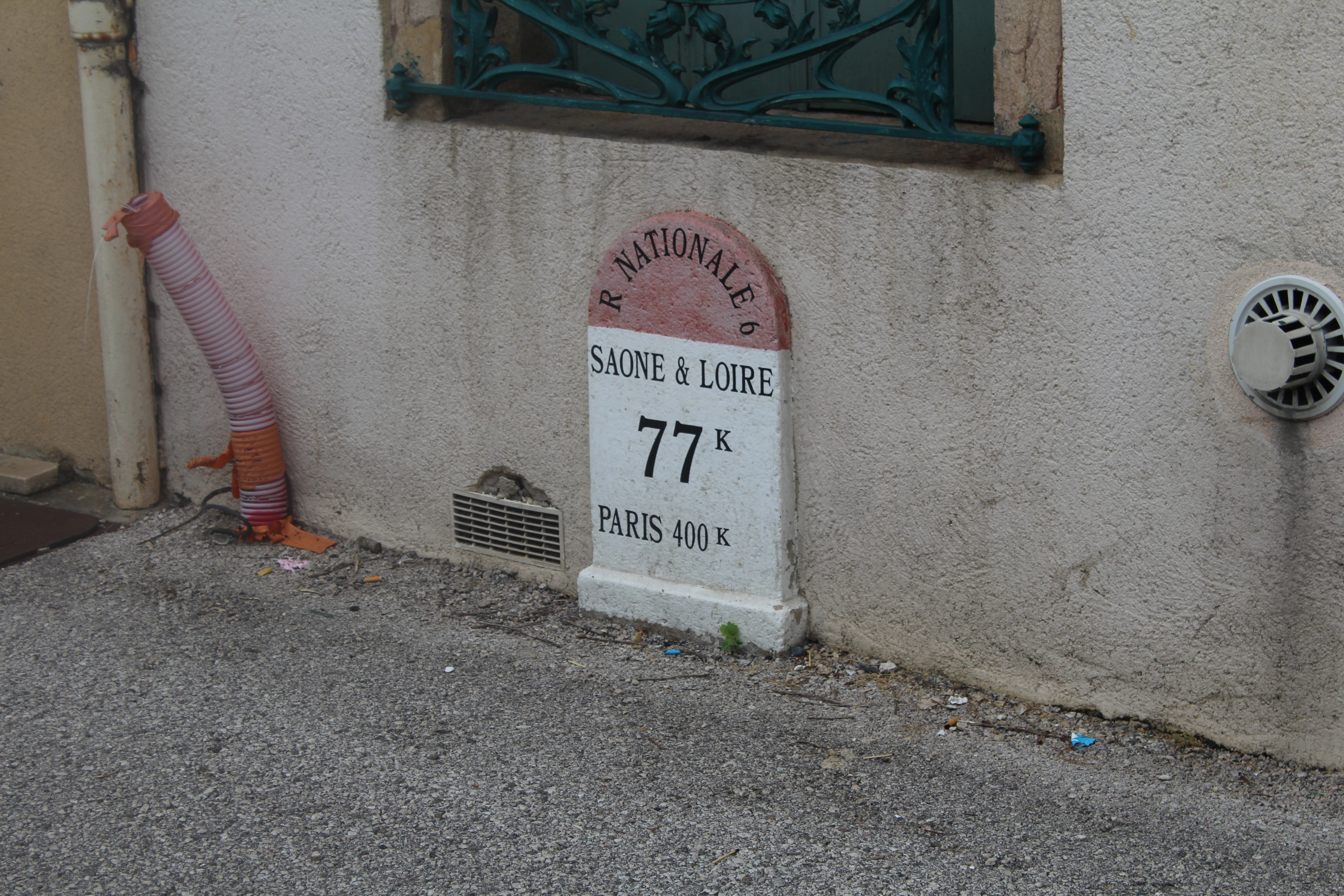 Borne 400 kilomètres de la nationale 6 à Mâcon près du rond-point de Saint-Clément.